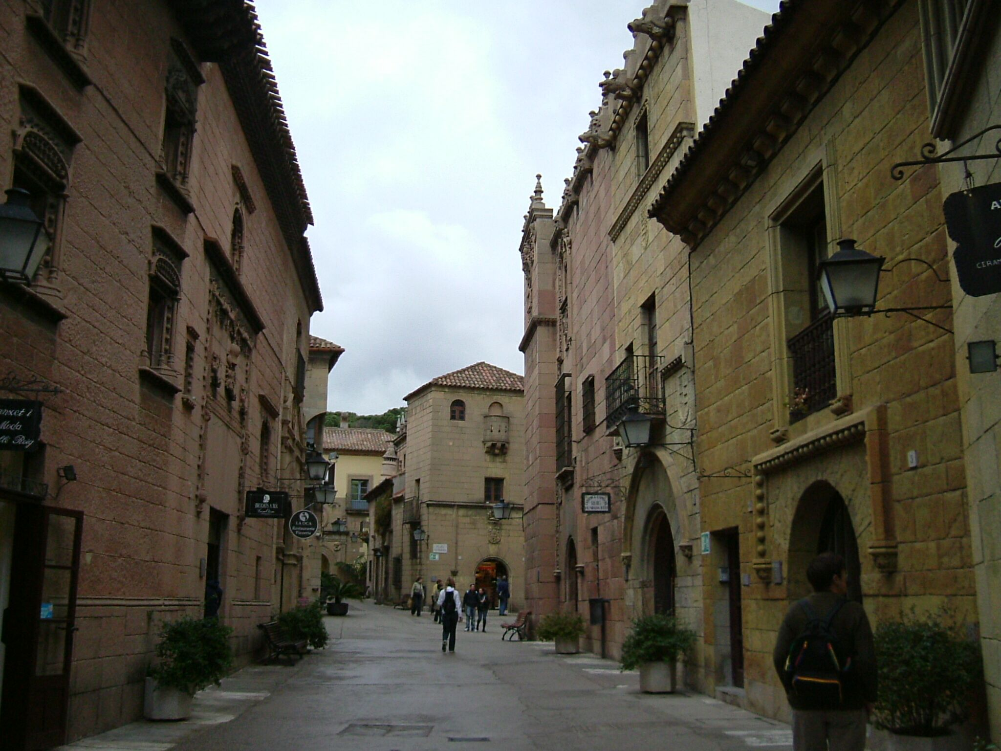 Poble Espanyol, Barcelona, Spain